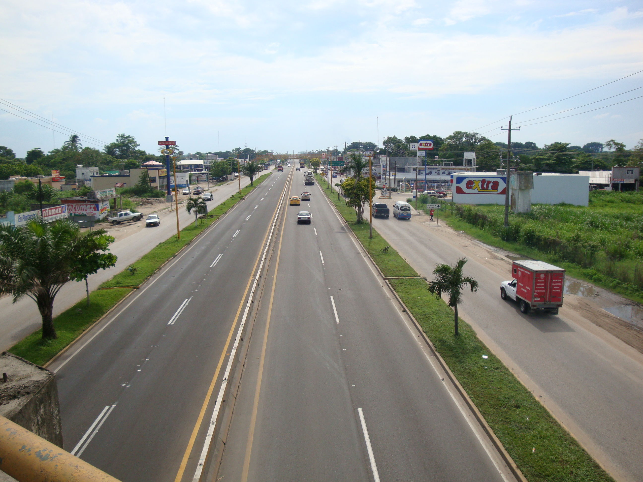 Panorámica de la carretera federal 180, Circuito del Golfo, en la ciudad de Heroica Cárdenas, estado de Tabasco, México.